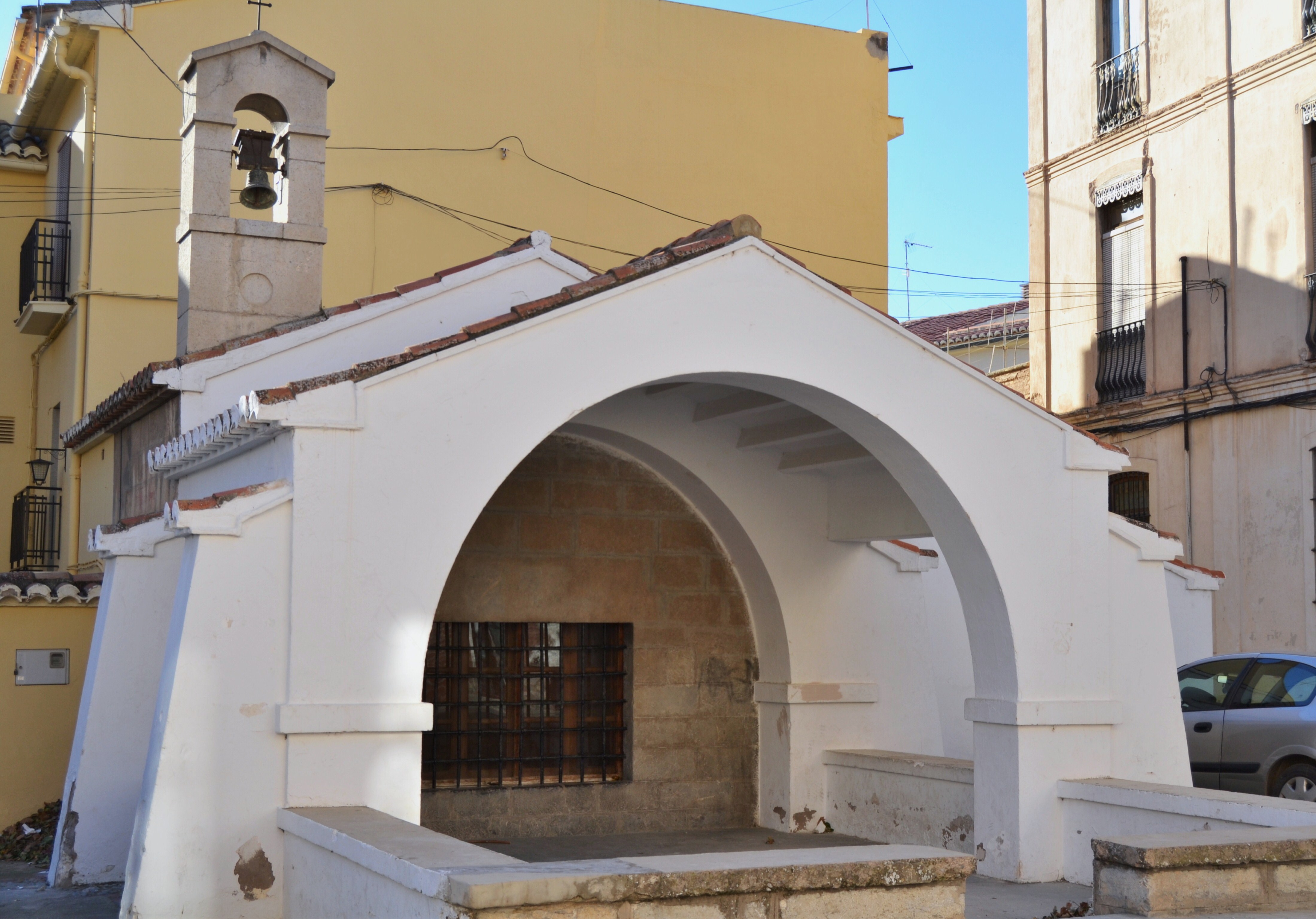 Ermita de la Mare de Déu de Loreto de Xèrica.